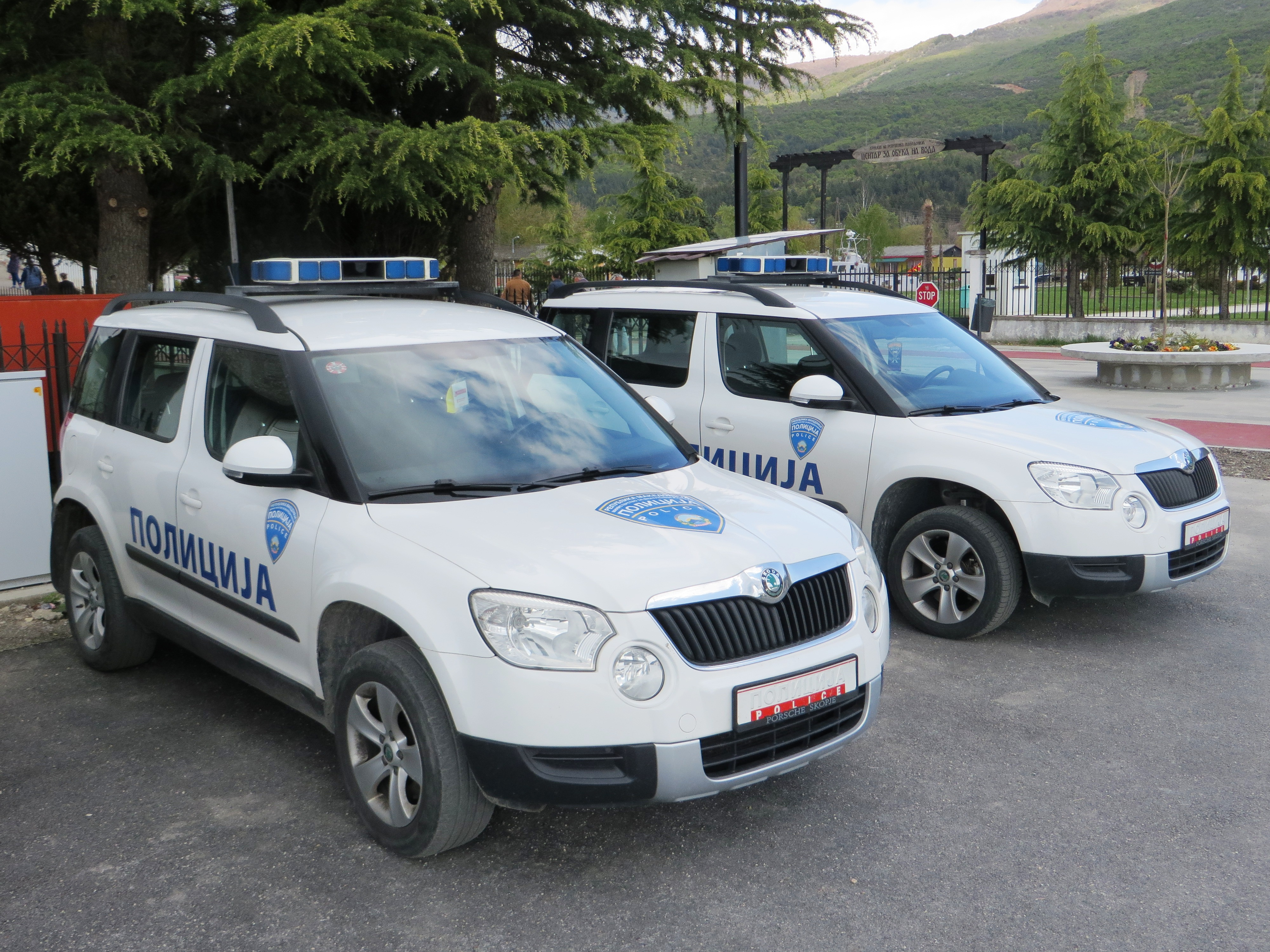 politie auto Macedonië